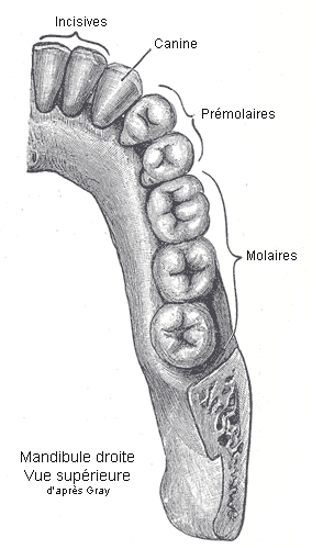 Hémi mandibule droite avec dentition définitive